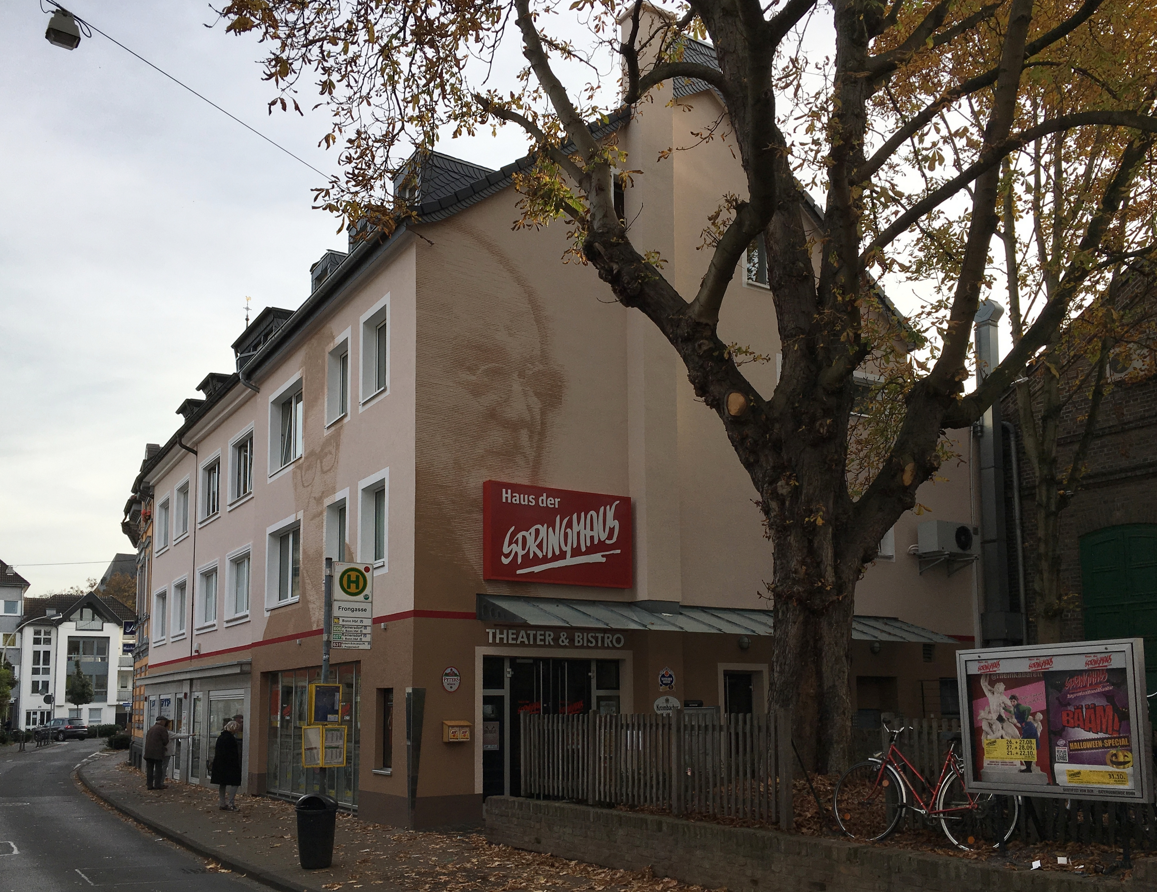 Bonn-Endenich, Frongasse 8–10: «Haus der Springmaus»; Improvisationstheater, Kabarett- und Kleinkunstbühne. Seit September 2016 ist die Fassade mit den Konterfeis von Hanns-Dieter Hüsch (langjähriger Ehrenvorsitzender des Vereins "Haus der Springmaus e.V.") und Roger Willemsen (Bonner und Freund des Hauses, Texter) versehen.